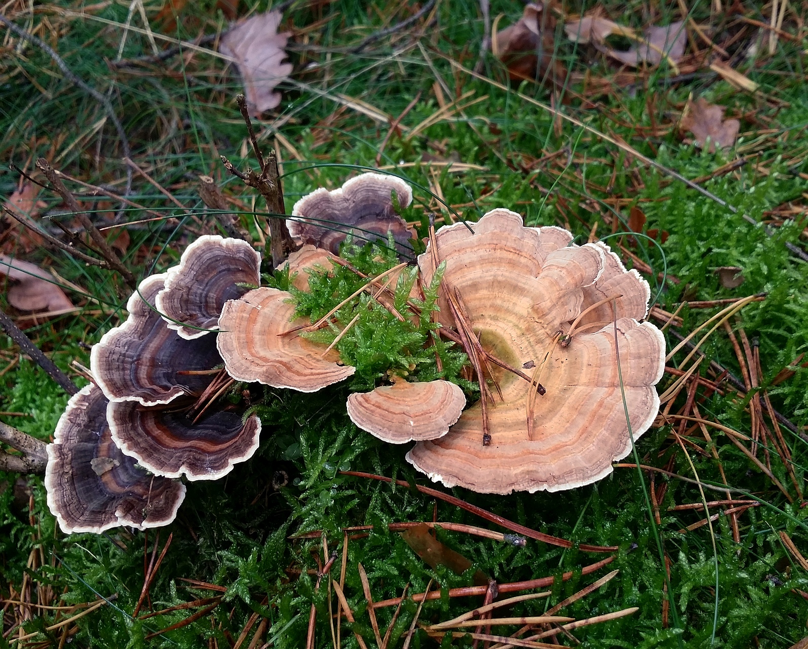 Wrośniak różnobarwny (Trametes versicolor) - zróżnicowanie kolorystyczne owocników w tym samym siedllisku.